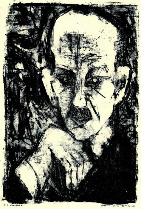 Portrait of Carl Sternheim. Lithographie 1916. 30,7 x 20,8 cm. Werkverzeichnis Dube L 328 C